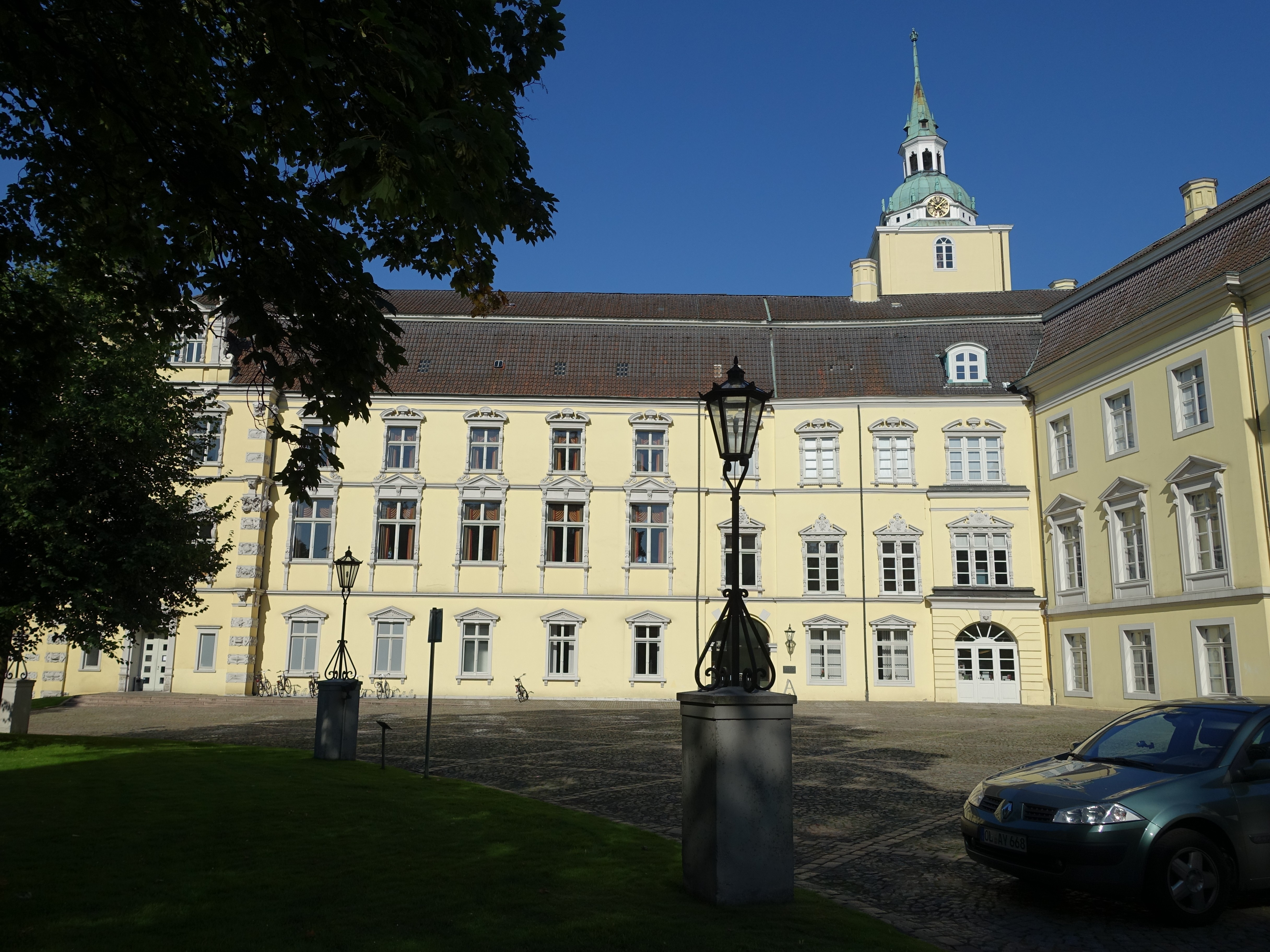 Oldenburg (Oldenburg) - Schloss